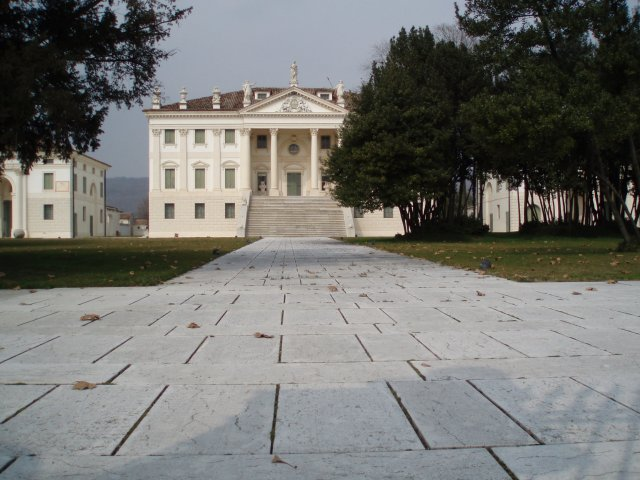 Villa Spineda nella frazione di Venegazzù nel comune di Volpago del Montello vista frontale